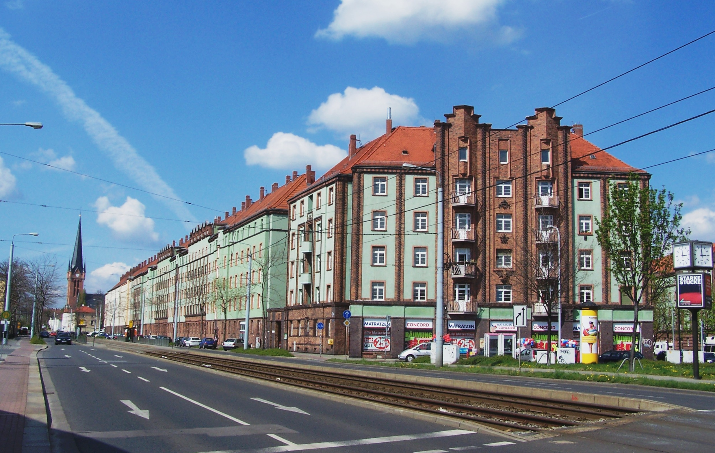 Wohnanlage Hansastraße in der Leipziger Vorstadt, links im Hintergrund die Petrikirche